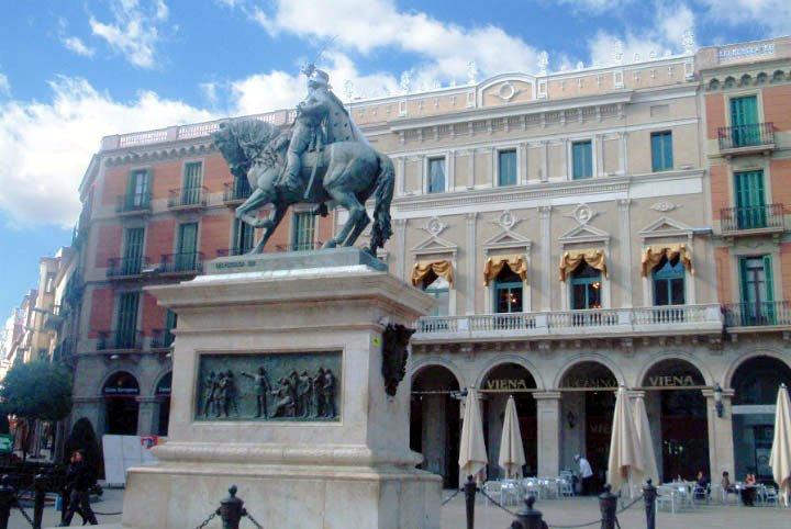 Monument a Juan Prim, Reus, Catalunya.